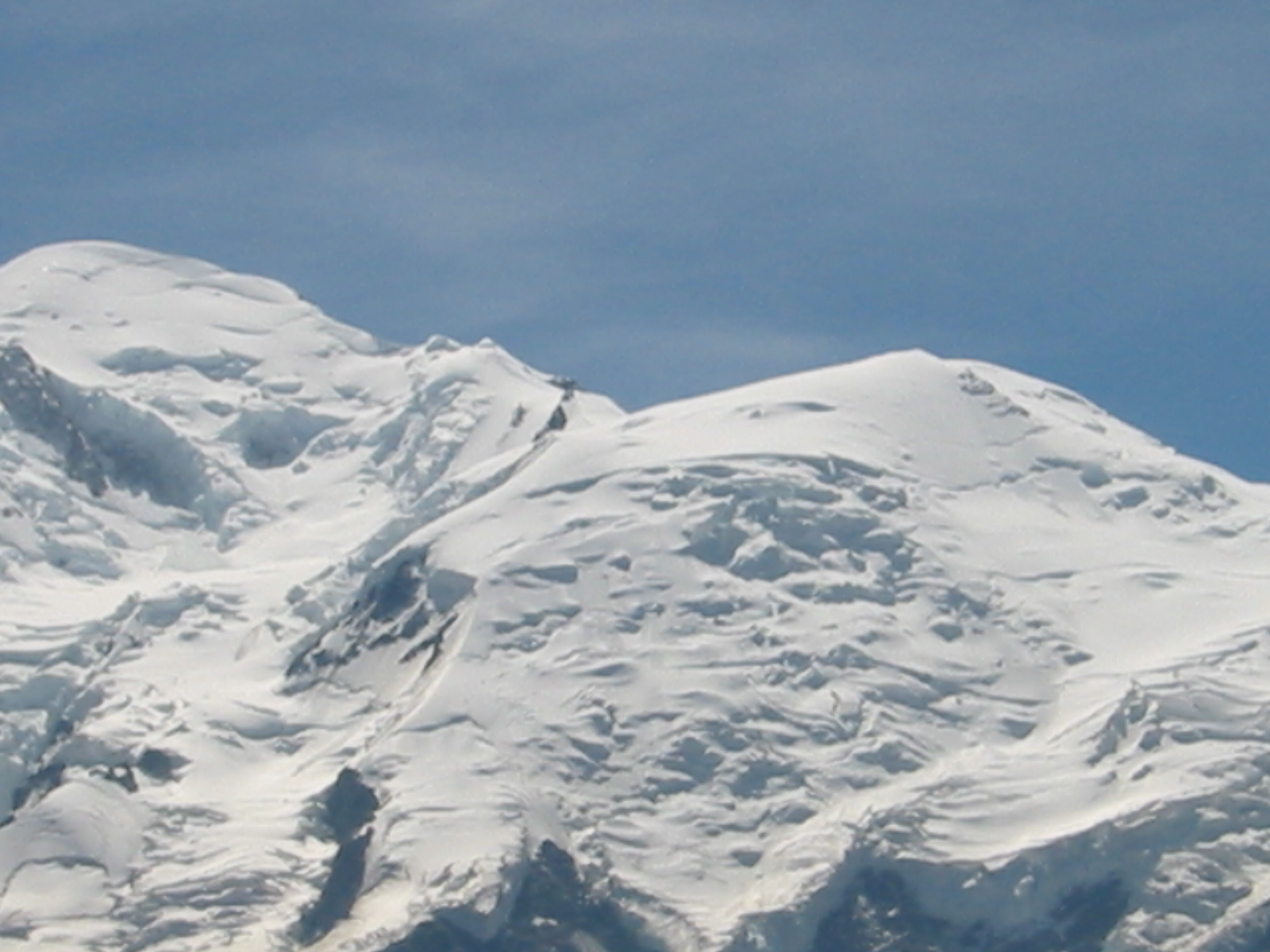 Le sommet du Mont-Blanc et le dôme du Goûter, 2006.